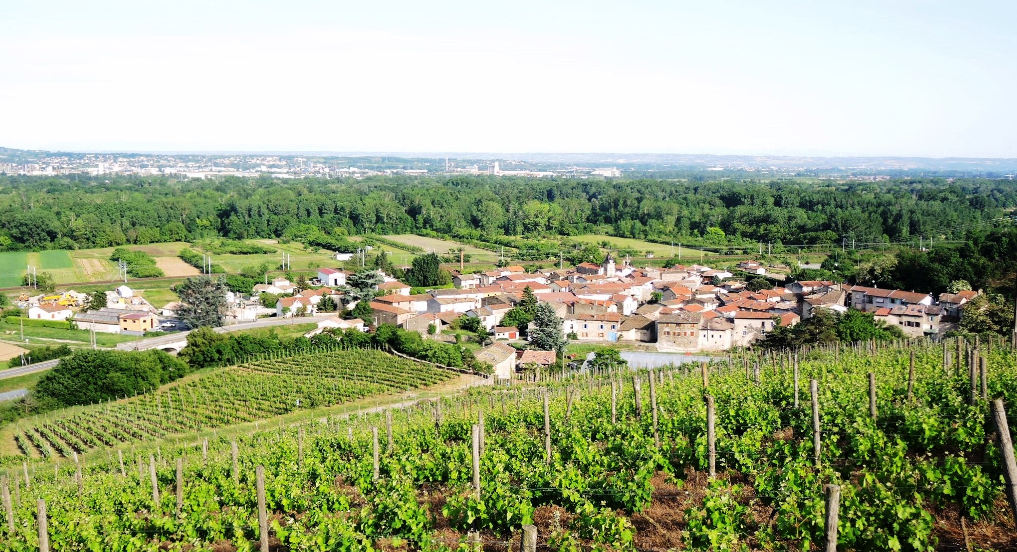 Limony détail